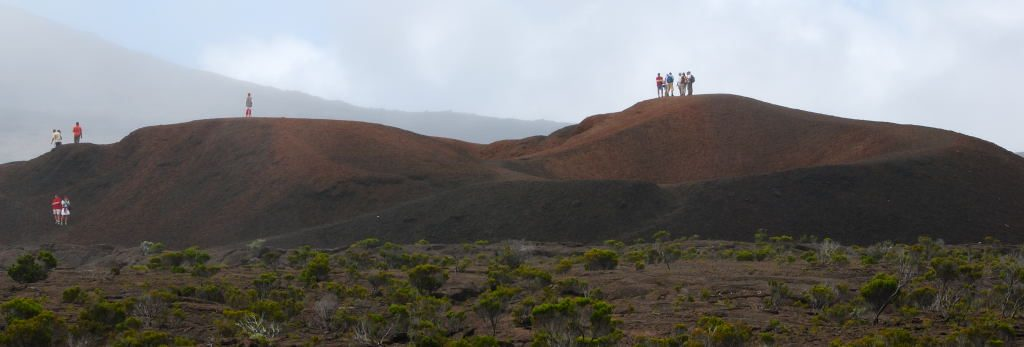 Des randonneurs sur le Formica Leo entouré d'une végétation éparse en février 2008. Des randonneurs sur le Formica Leo, un cône volcanique fortement érodé du fait de sa fréquentation touristique.